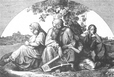 Kupferstich von Ferdinand Ruscheweyh nach einem Gemälde Eduard von Bendemanns